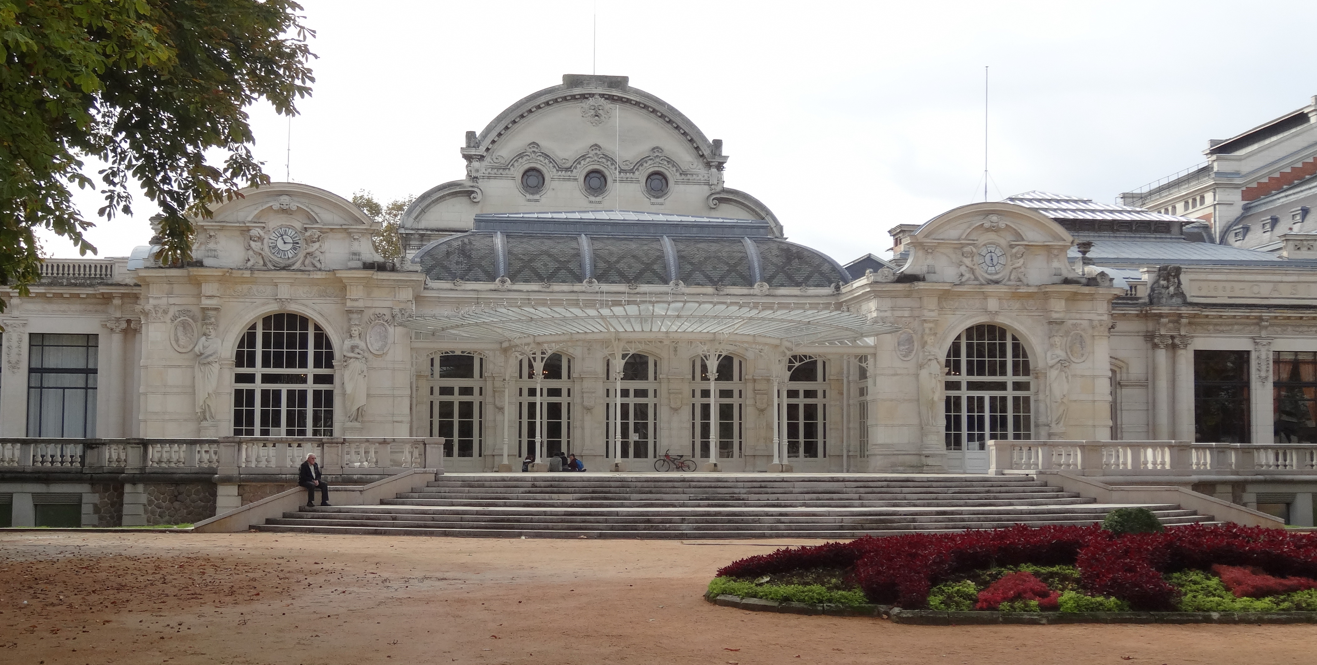 Palais des congrès de Vichy - ex Casino - façade nord - style néo-baroque